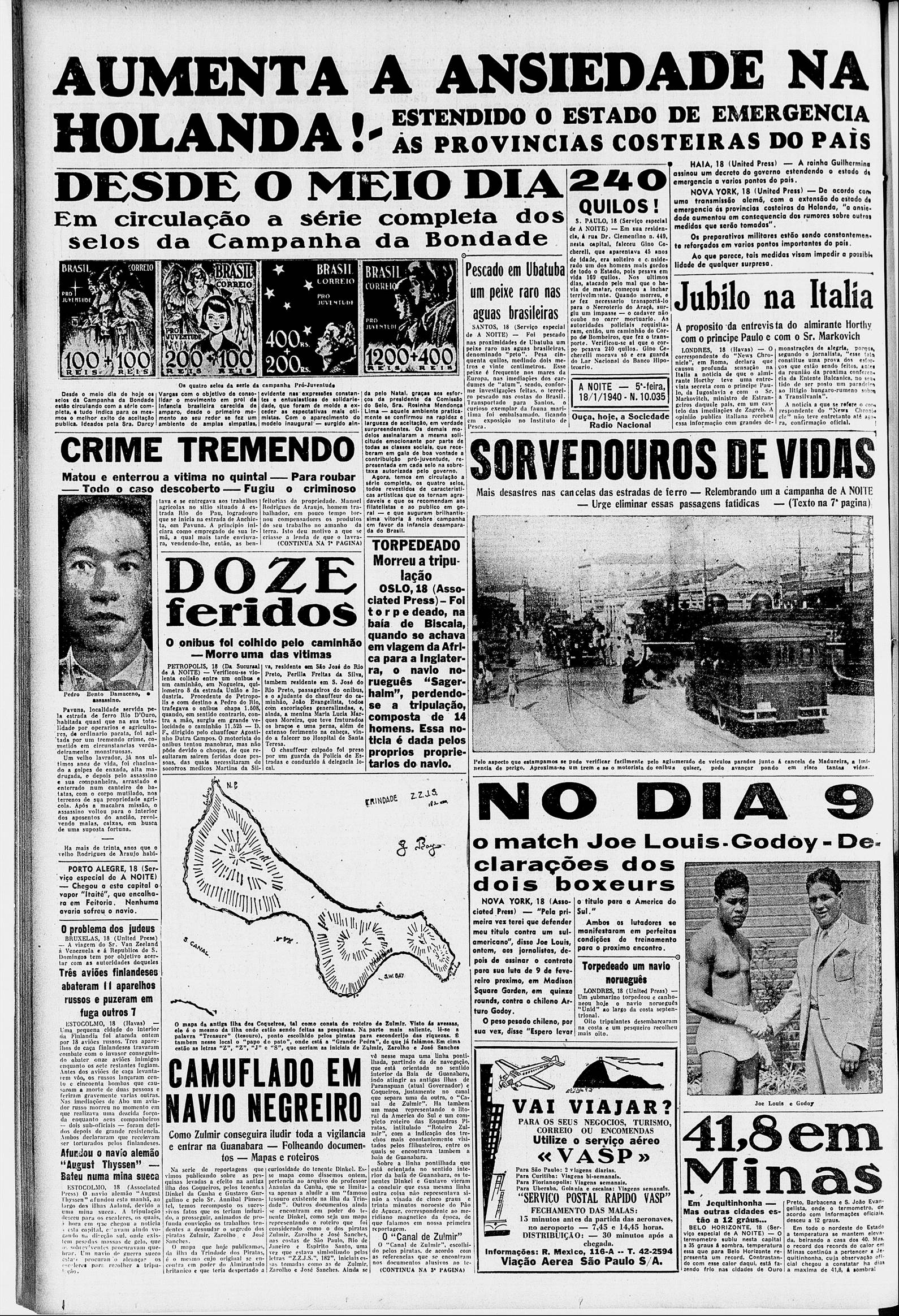 Mapa publicado no jornal A Noite (RJ) em 19.01.1940